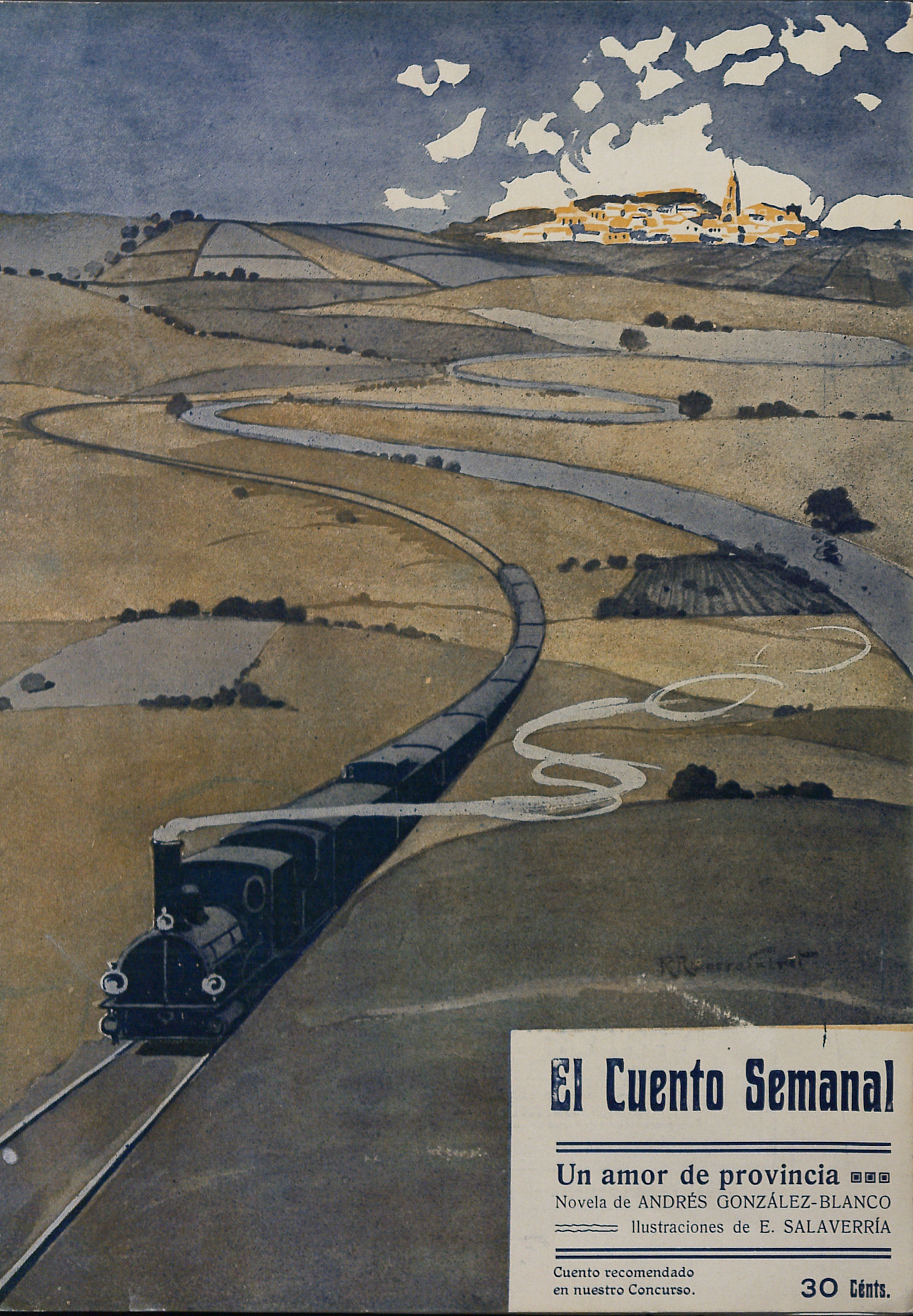 Portada de Un amor de provincia.